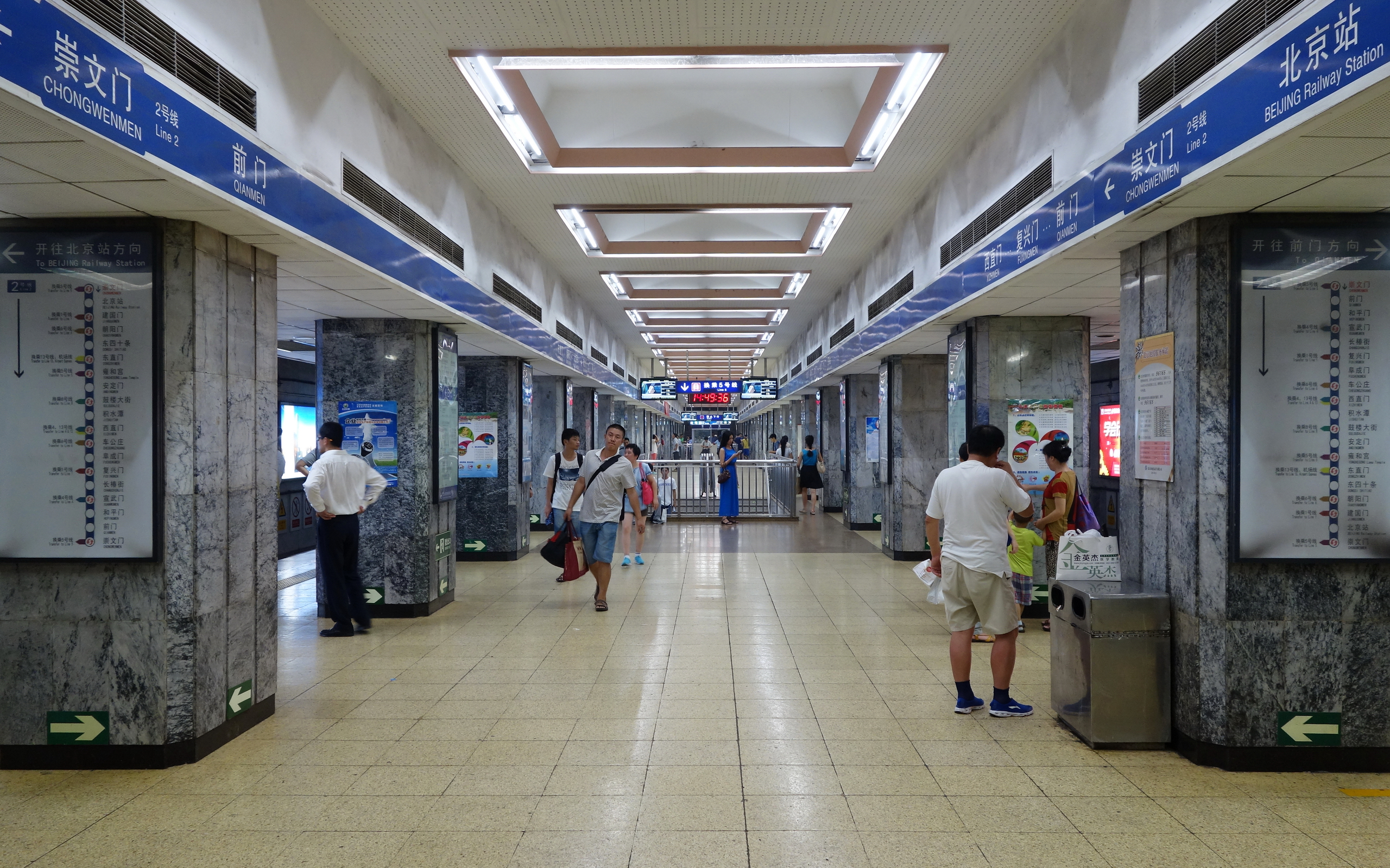 北京地铁2号线崇文门站岛式站台。